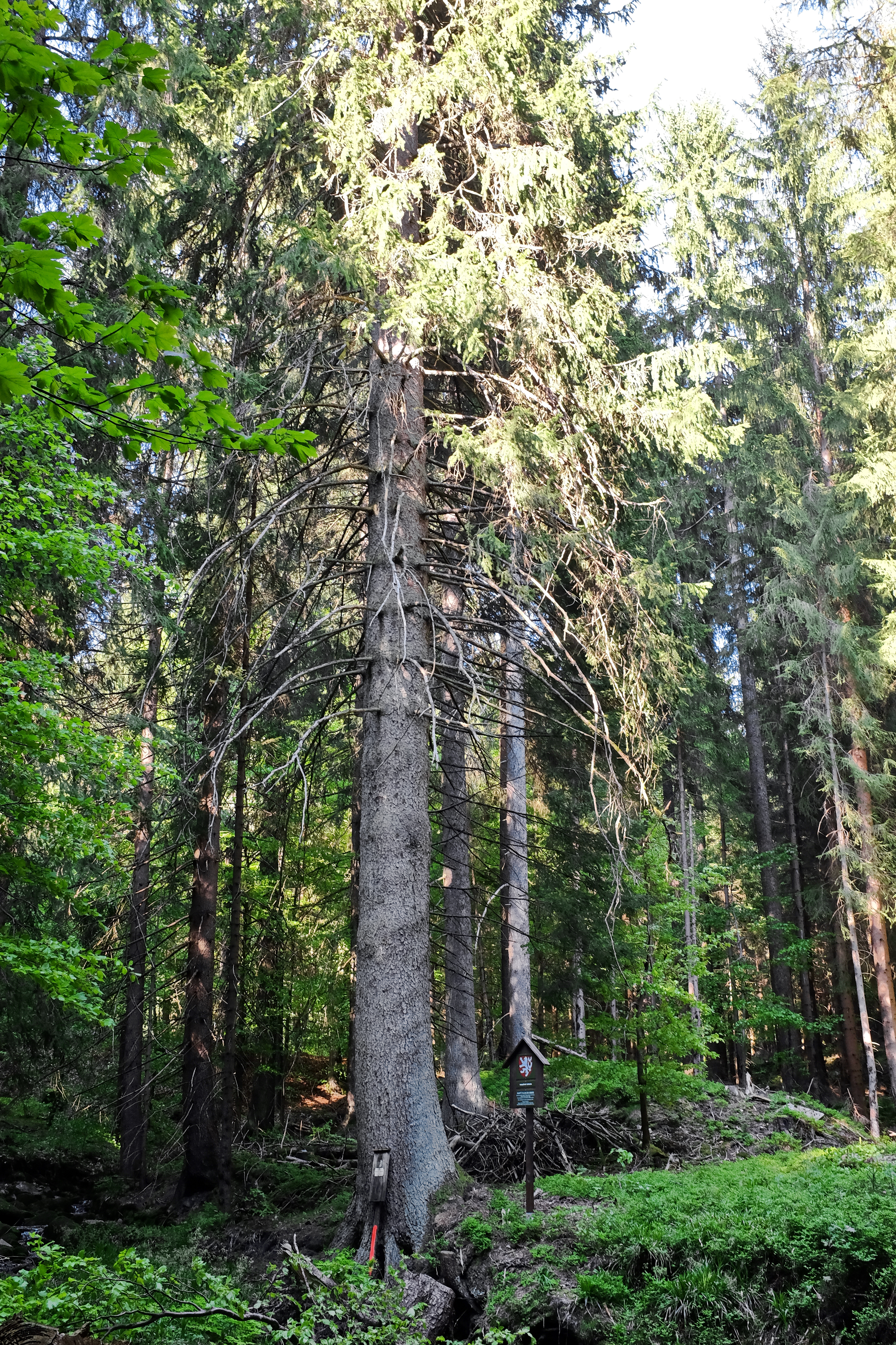 Památný strom - Nový Nancin smrk - Nancy, zaniklá osada obce Stříbrná, okres Sokolov